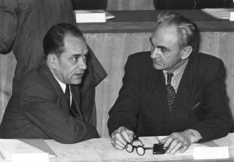 Illus/Sturm 31.10.51 13. und 14. Sitzung der Volkskammer Die Volkskammer der DDR trat am 31.10.51 und 1.11.51 zu ihrer 13. und 14. Sitzung zusammen, um u.a. über das "Gesetz über den Fünfjahresplan zur Entwicklung der Volkswirtschaft der Deutschen Demokratischen Republik", den Rechenschaftsbericht der Regierung über die Einnahmen der Republik und ihre Verwendung für das Rechnungsjahr 1950" und das "Gesetz über die Deutsche Notenbank" zu beraten. UBz: Stellv. Ministerpräsident Rau im Gespräch mit dem Staatssekretär Leuschner.